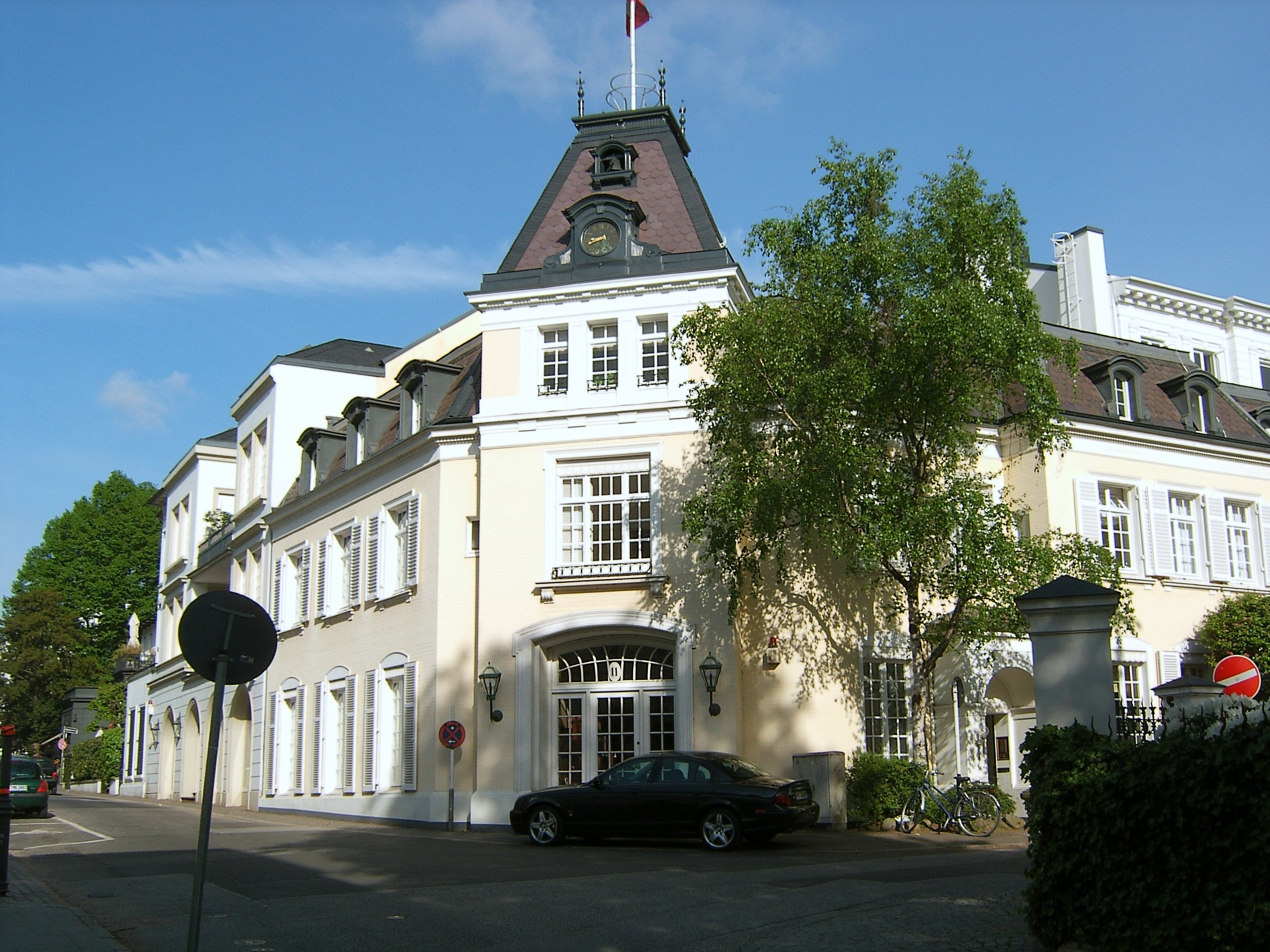 Hamburg, Pöseldorf, Milchstraße 11. This is a photograph of an architectural monument.